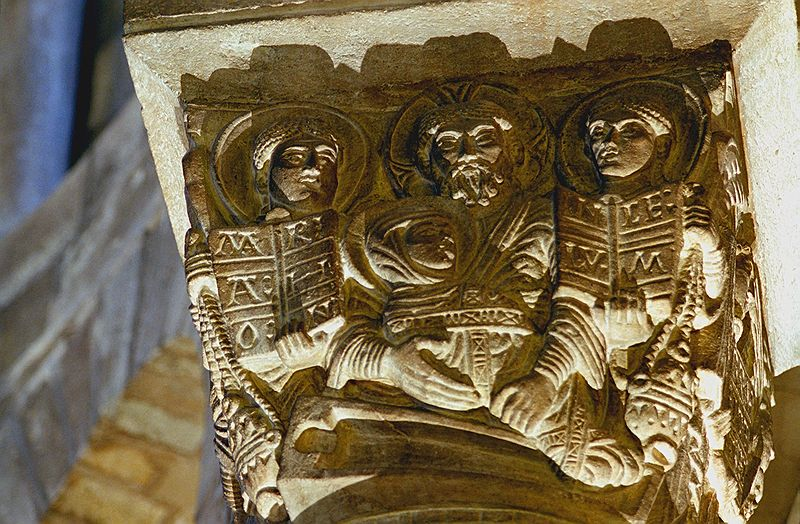 Dormition, Chapîteau de Notre-Dame du Port